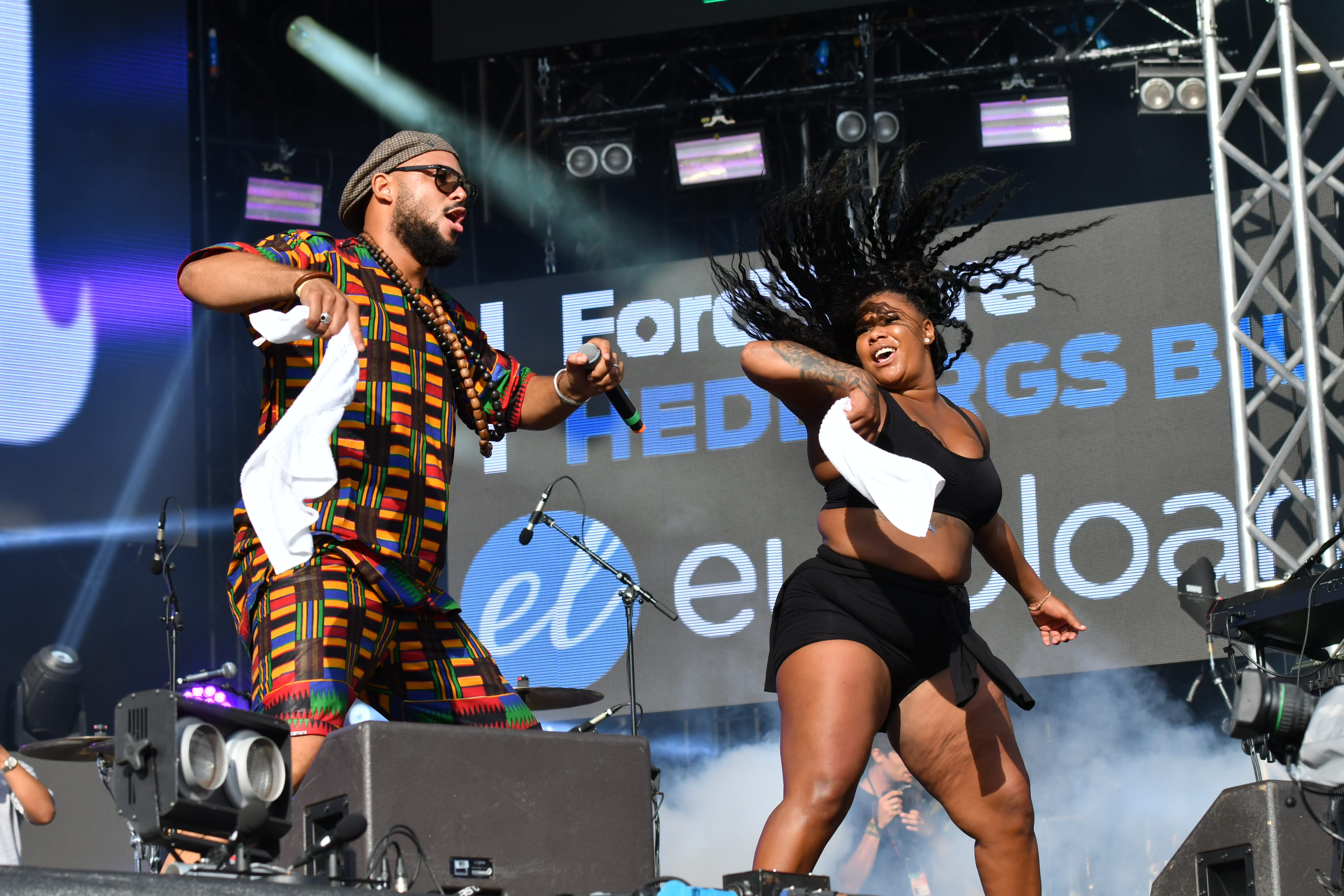 Kaliffa på Malmöfestivalen 2018.